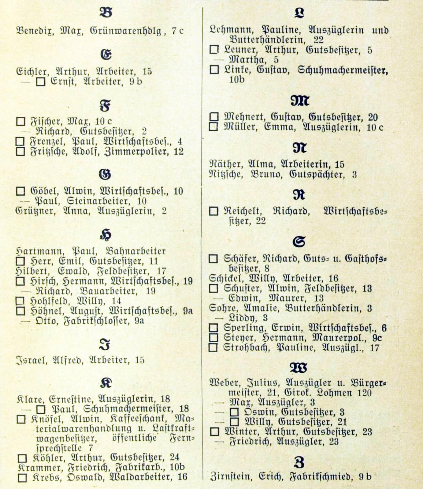 Im Jahr 1930 wurden die Einwohner von Hohburkersdorf im Einwohnerbuch für Neustadt in Sachsen, Stolpen und Hohnstein aufgeführt. (Viereck steht für Hausbesitzer)